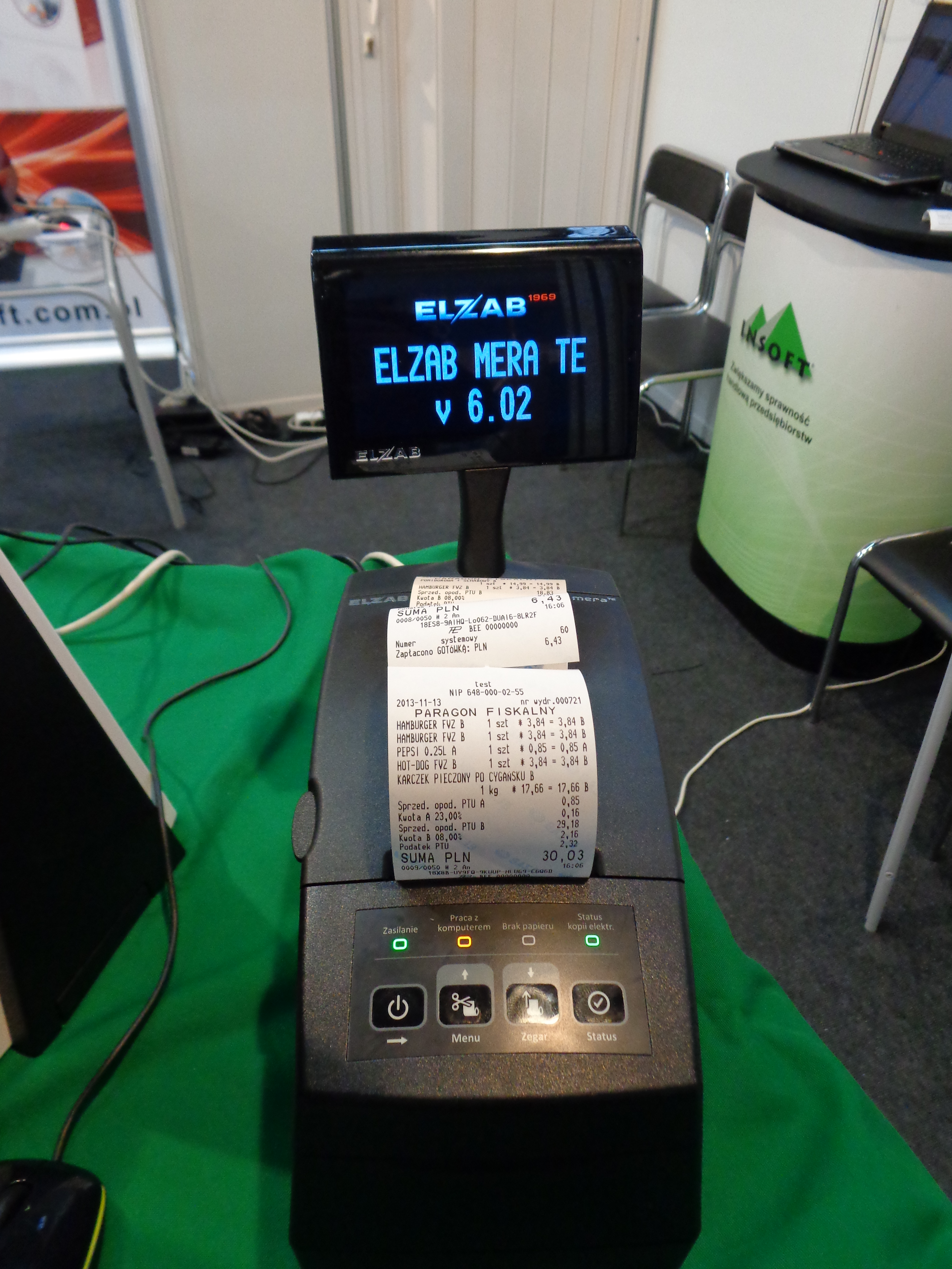 Drukarka fiskalna prezentowana podczas Targów HORECA 2013 w Krakowie.